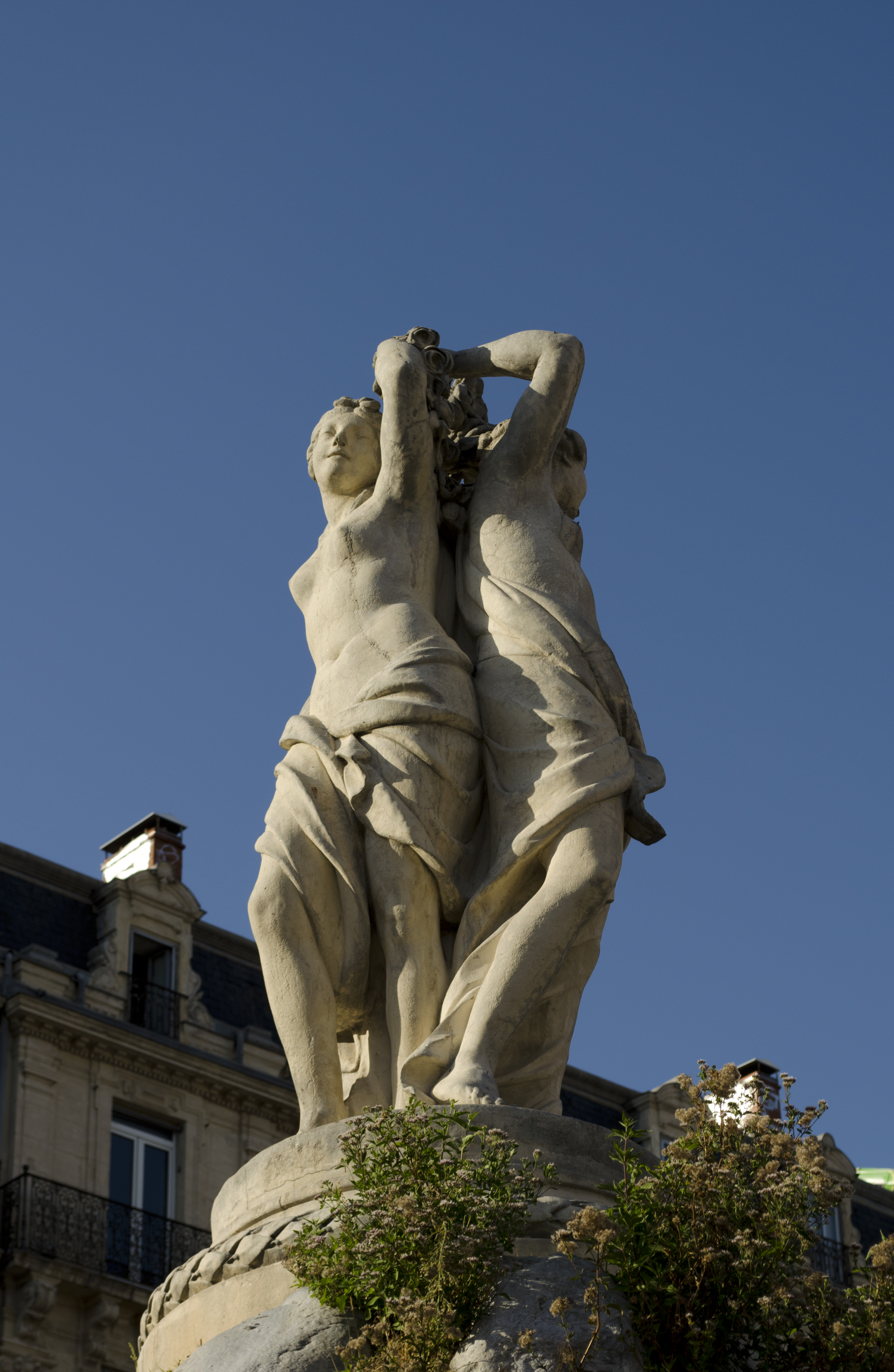 Statue des Trois Grâces situé au centre de la place de la comédie à Montpellier.